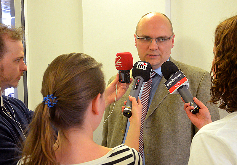 Die Eröffnung des Portals des Bildarchivs der Region Hannover erläuterte Archivleiter Sebastian Post am 27. Juni 2017 im Interview mit den Sendern Radio Leinehertz 106.5, radio ffn und Radio Hannover ...